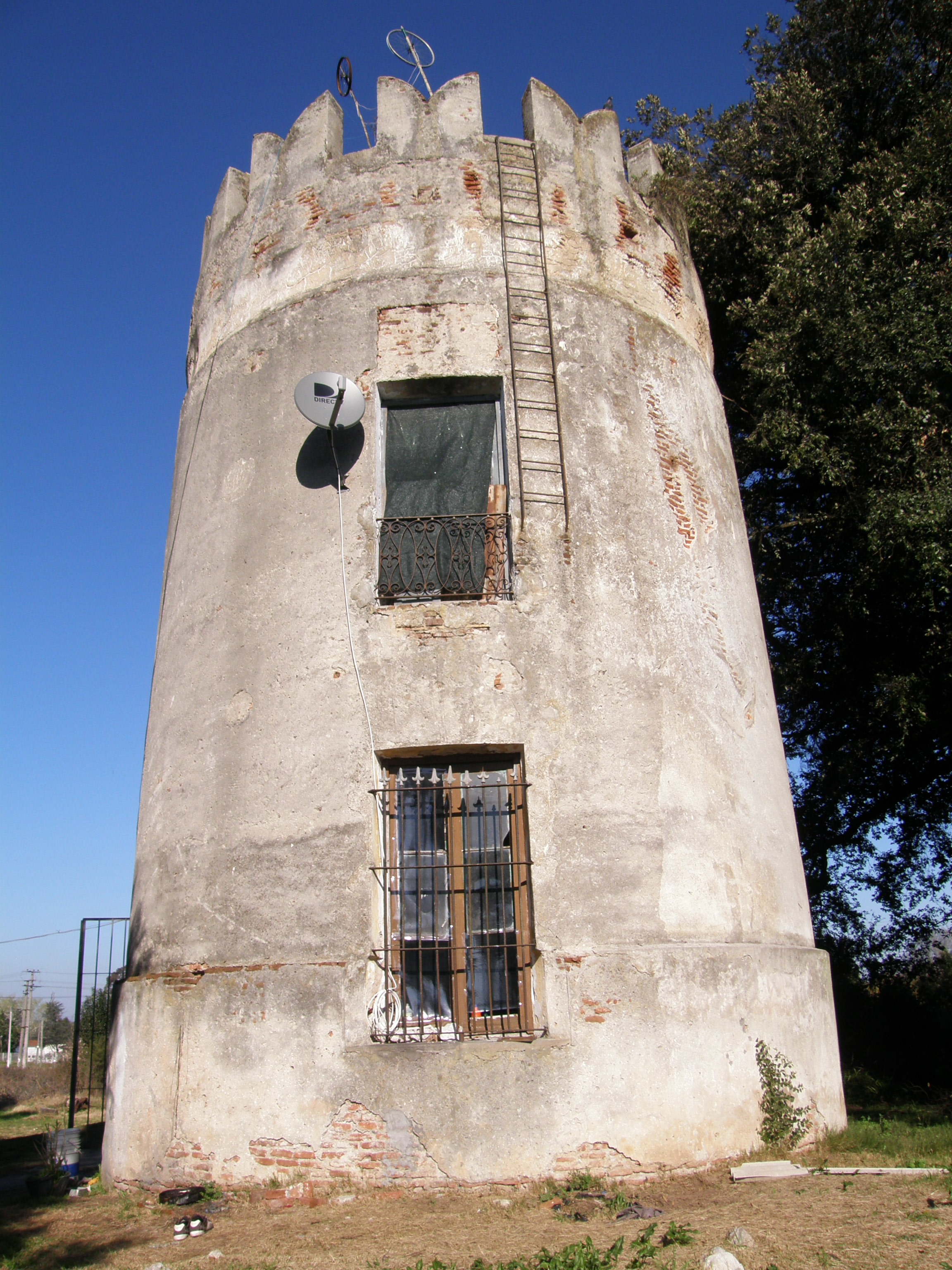 Monumento Histórico Nacional ubicado en Pando, Uruguay